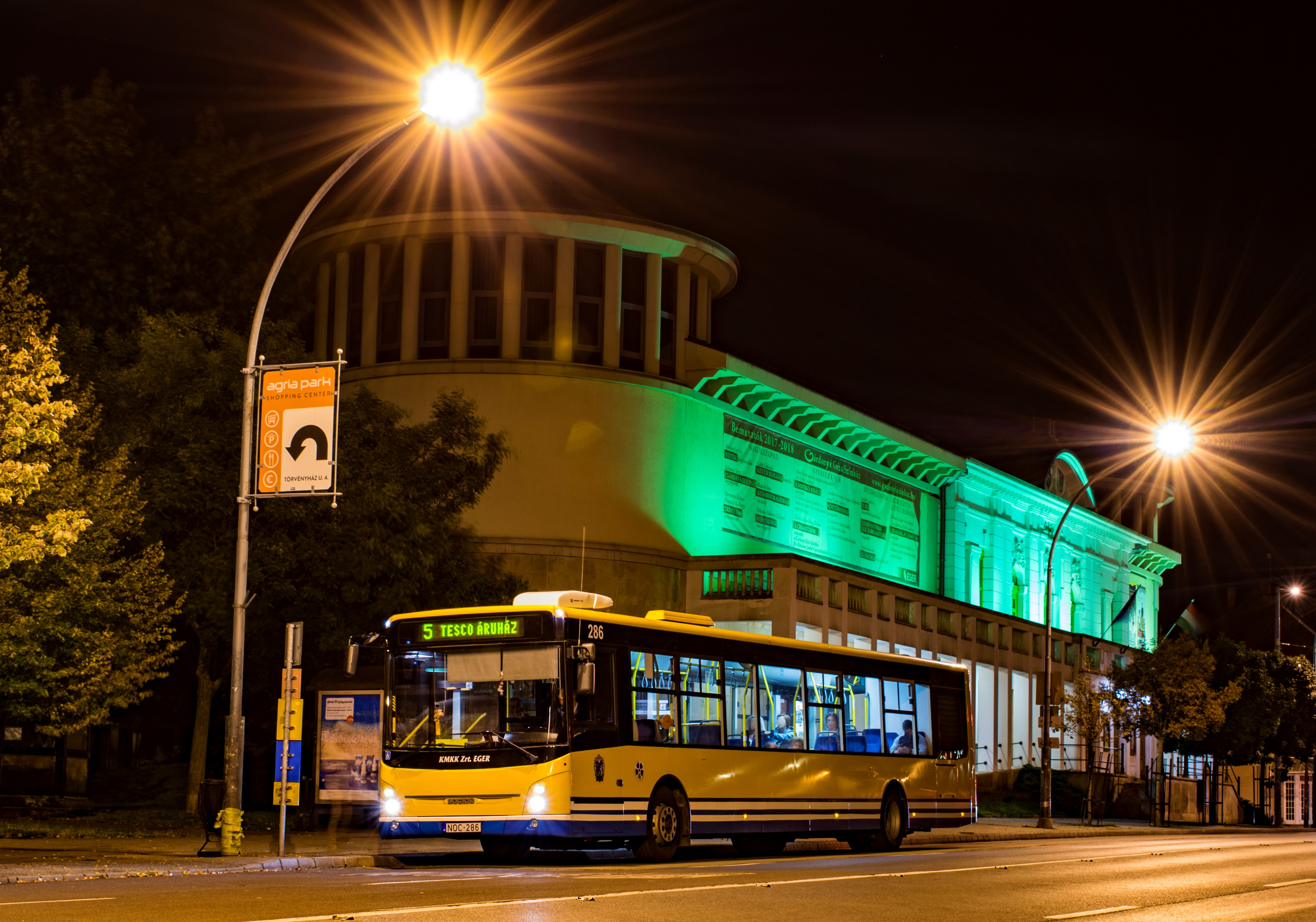 Az 5-ös busz, útlezárás miatt a Gárdonyi Géza Színház előtti buszmegállóban.